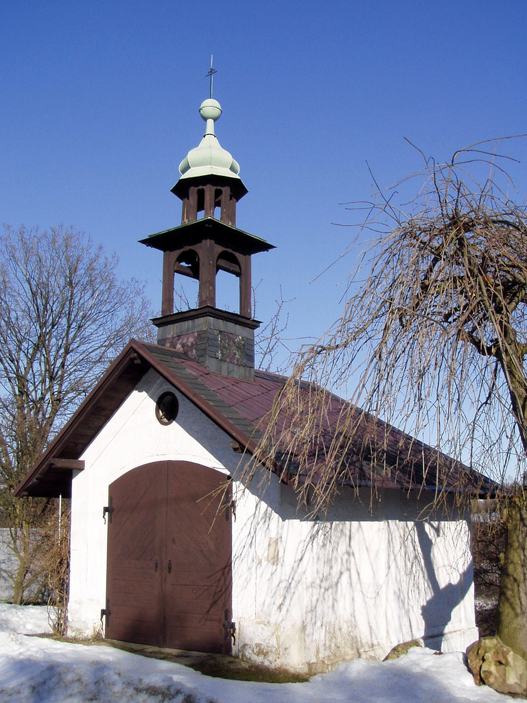 Sedlejovice